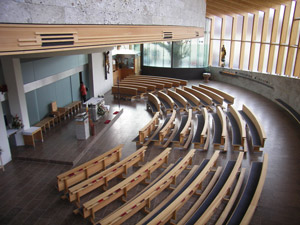 Kirche A-4713 Gallspach